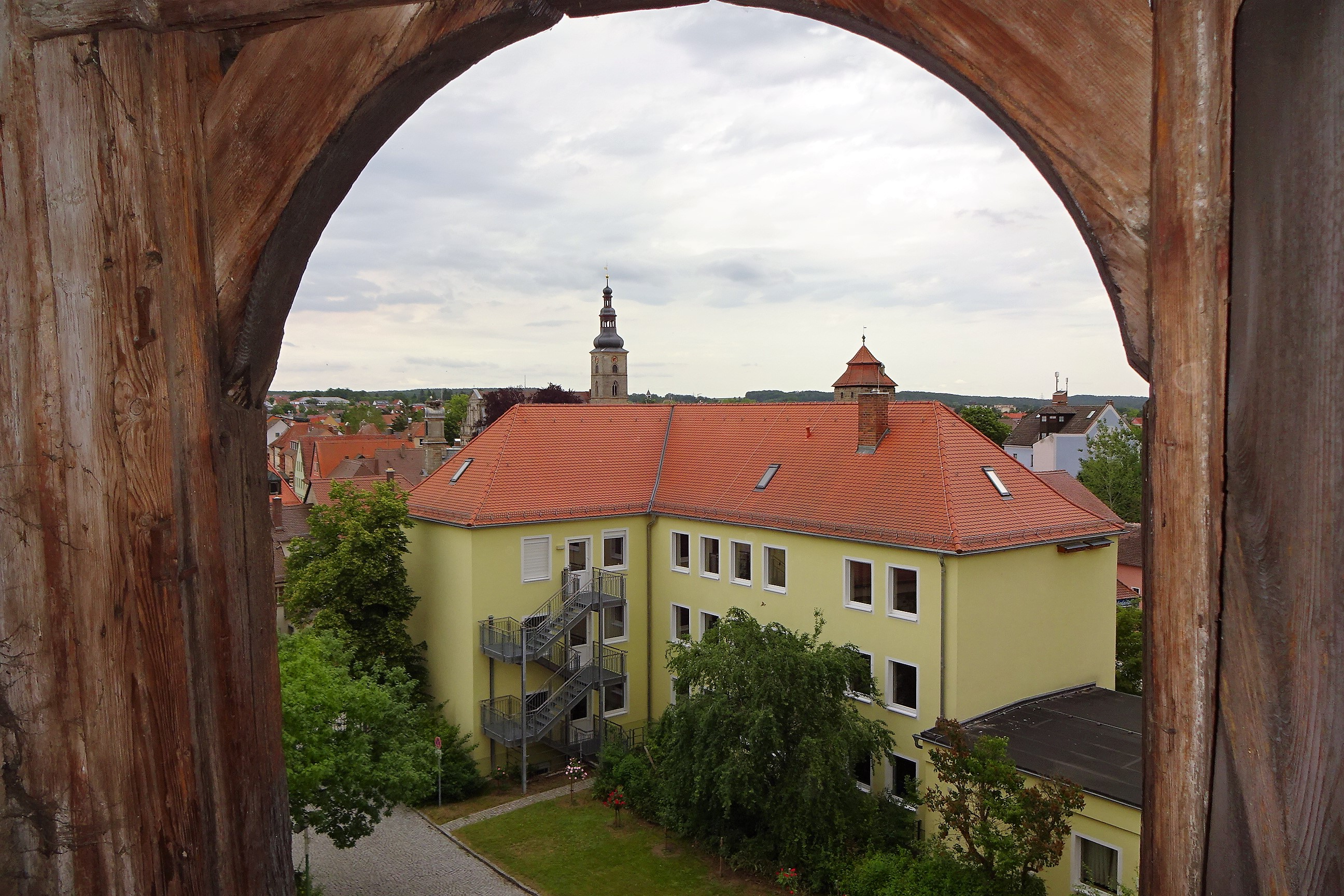 Höchstadt Aisch Blick vom Schloss Dachfenster auf Landratsamt und Stadt